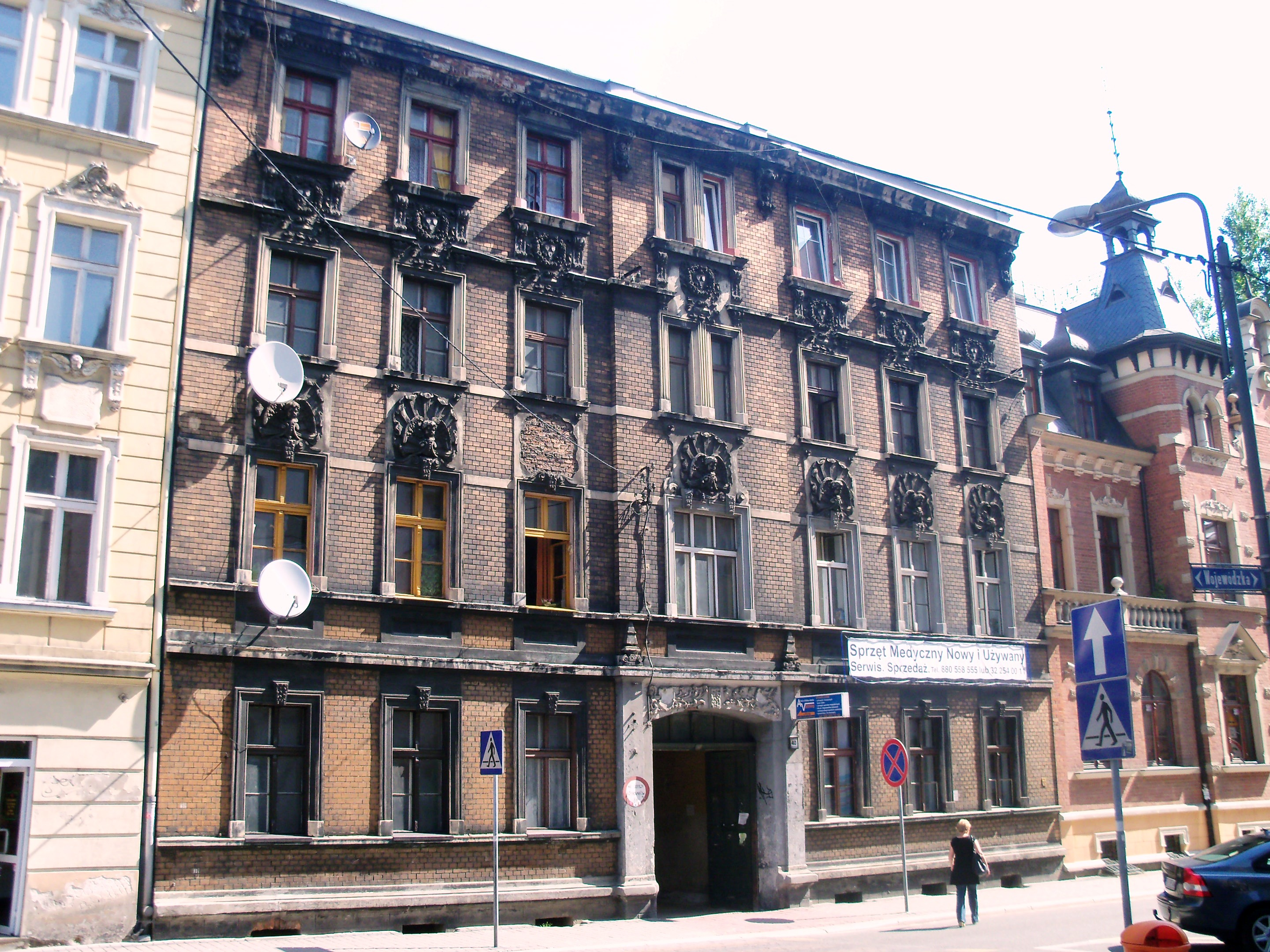 Budynek przy ul. Wojewódzkiej 40 w Katowicach